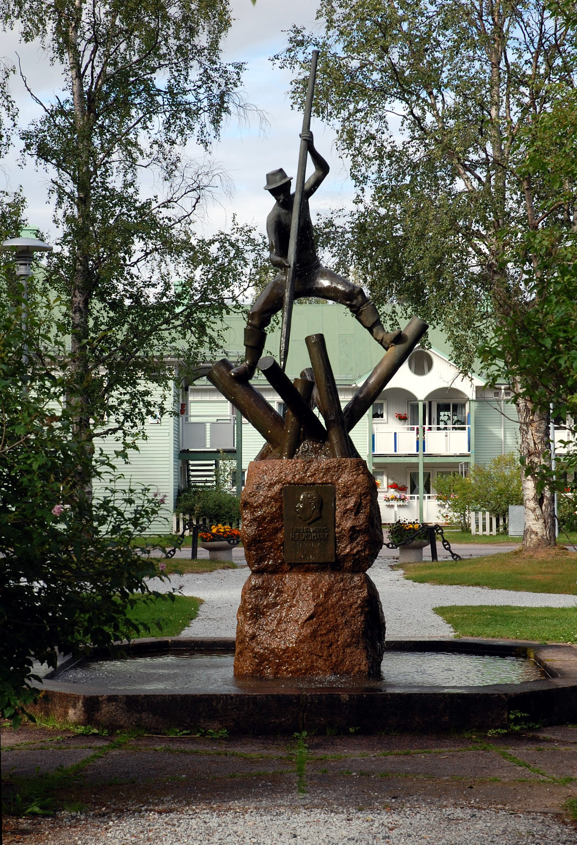 Timmerflottaren, skulptur i parken Jokkmokk, av Runo Lette (Johansson), brons och granit, 1954